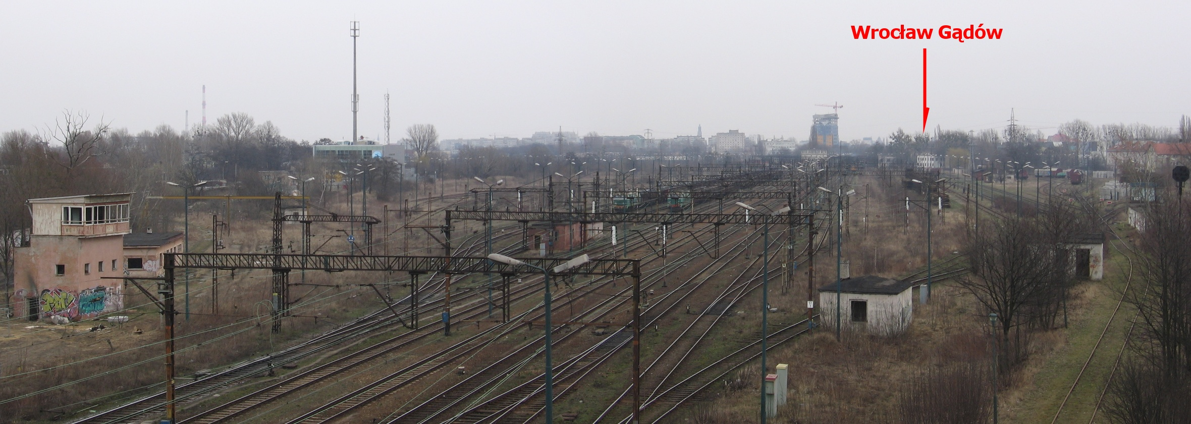 stacja towarowa Wrocław Gądów; budynek stacyjny, zaznaczony czerwoną strzałką, widoczny jest na zdjęciu Image:WroclawGadow-budynek.jpg